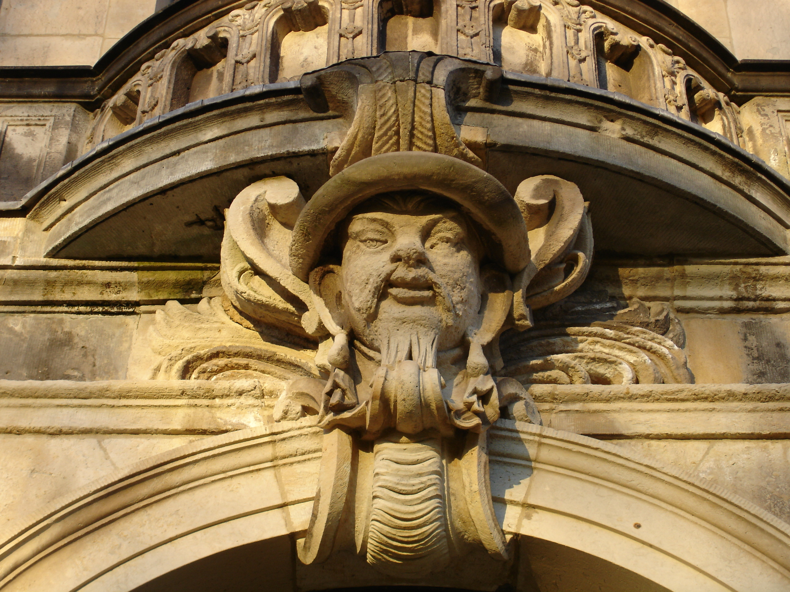 Dresden: Japanisches Palais (Uferseite)